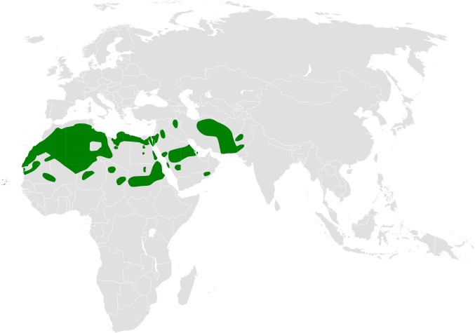 Ammomanes cincturus distribution map, based on